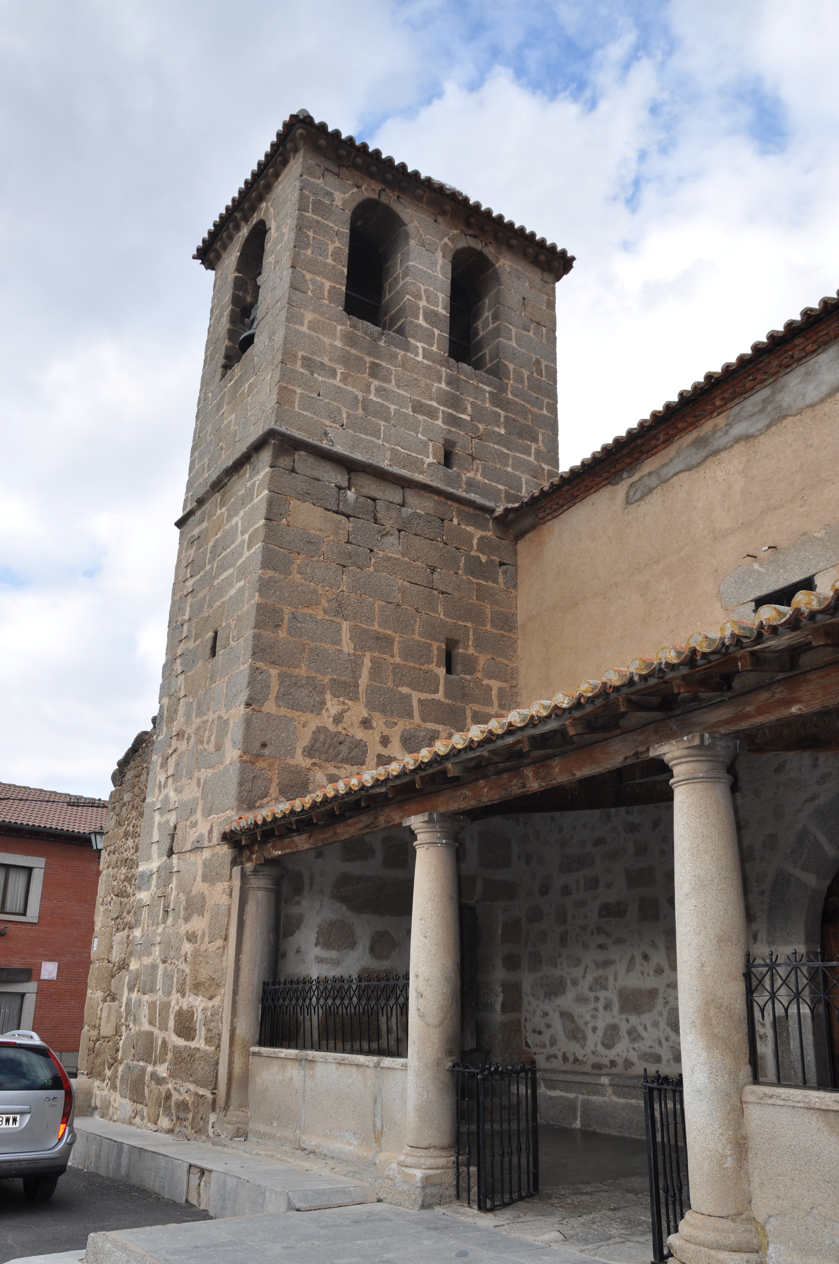 Pórtico de la iglesia de Mesegar de C. AV, España